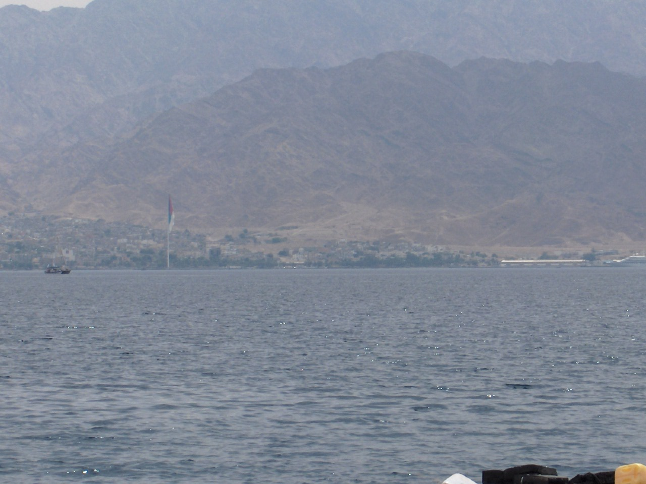 Aqaba vom Roten Meer (Eilat Ufer), April 2006